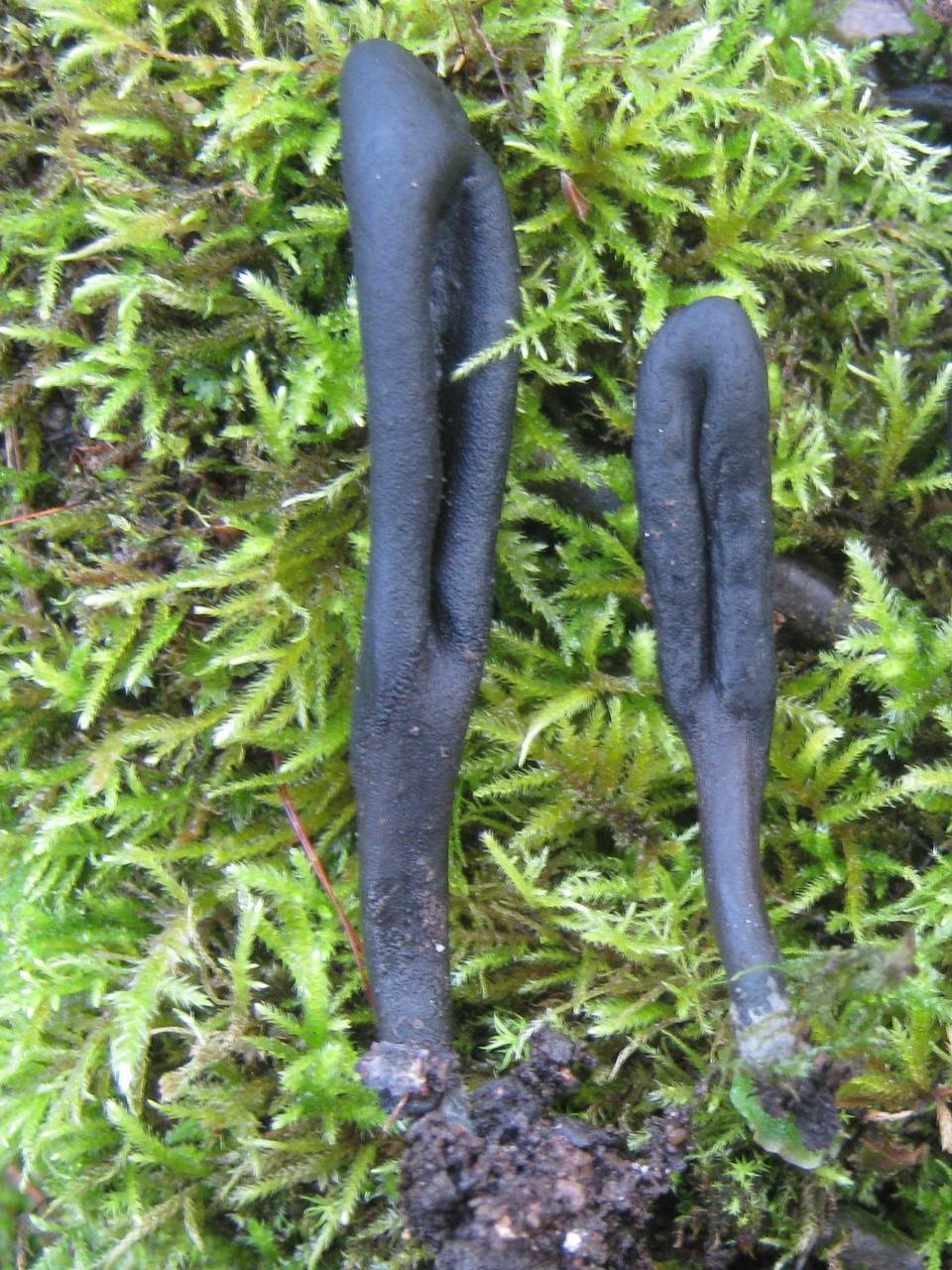 Geoglossum cookeanum Parque de Monsanto, Lisboa, Portugal Average values for the dimensions of the spores: Me = 67.3 × 6.2 µm ; Qe = 11 (N=20).